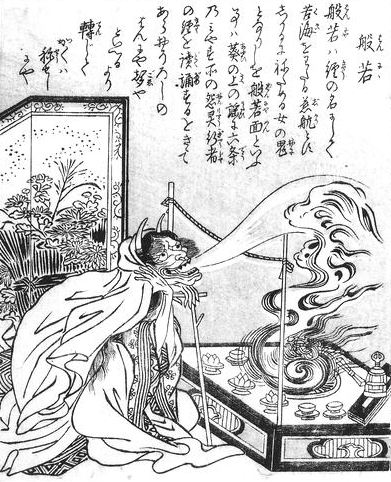 Hannya (般若, a noh mask representing a jealous female demon) from the Konjaku Gazu Zoku Hyakki (今昔画図続百鬼)